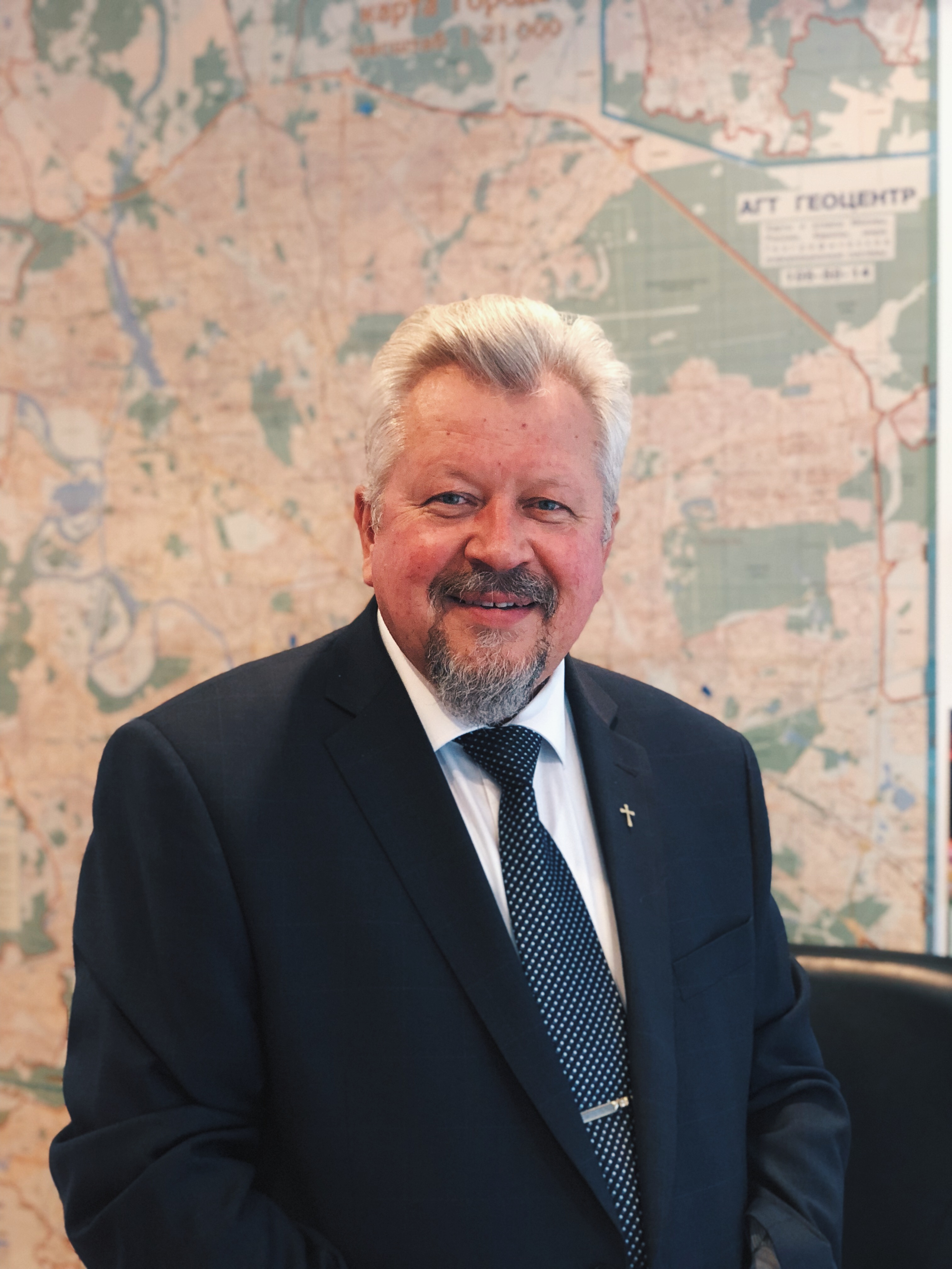 Председатель РСЕХБ Мицкевич Петр Вальтерович